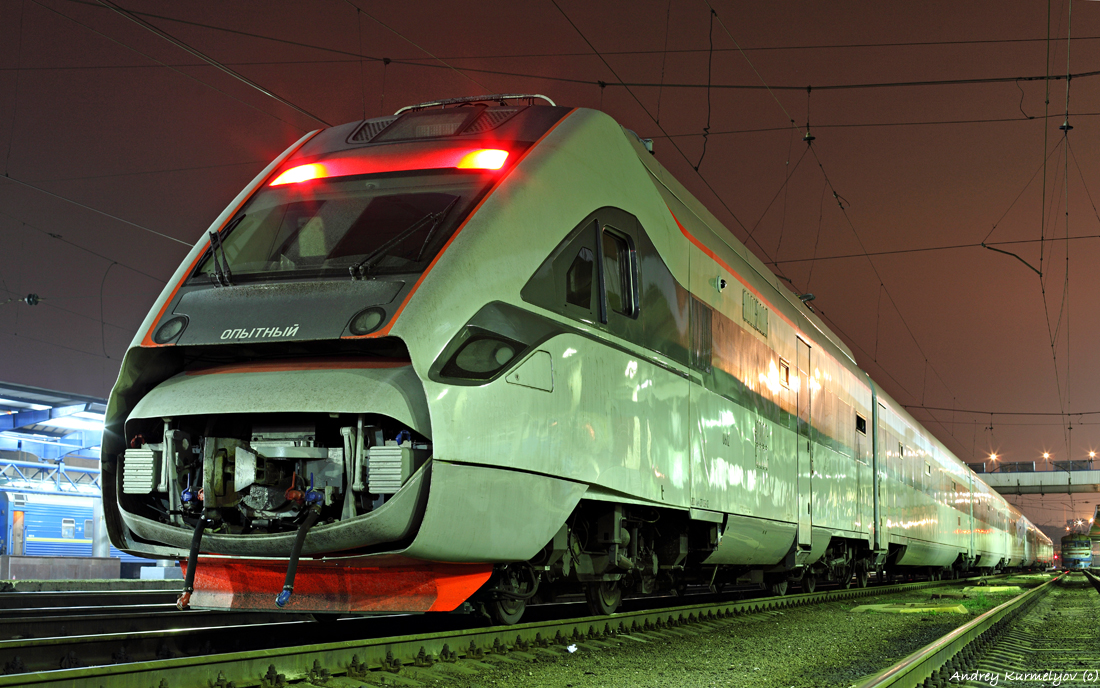 Электропоезд ЭКр1-001 на станции Днепропетровск